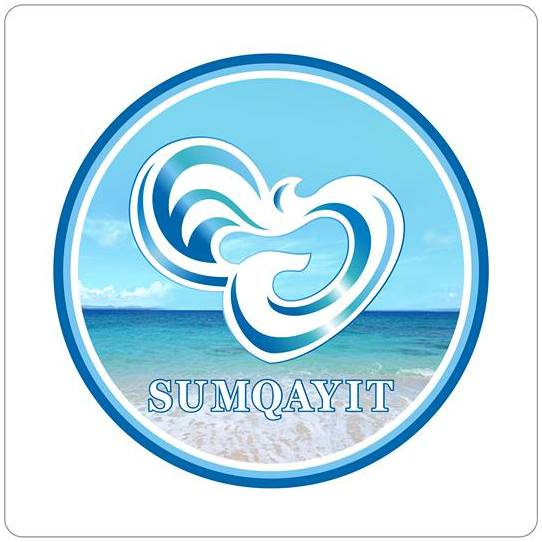 Sumqayıt şəhərinin emblemi